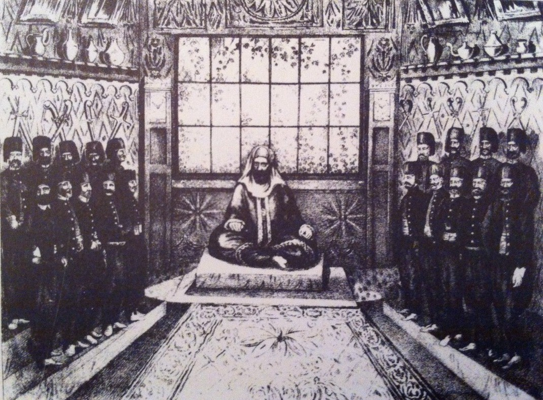 Gravure montrant une audience d'Hussein II Bey en habits orientaux, entouré de ses dignitaires mamelouks en tenues européennes